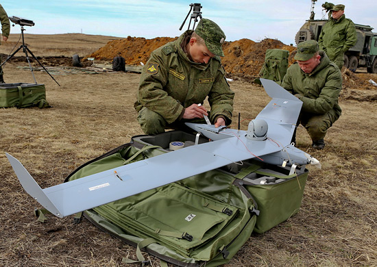 Беспилотник Застава (Bird-Eye 400).